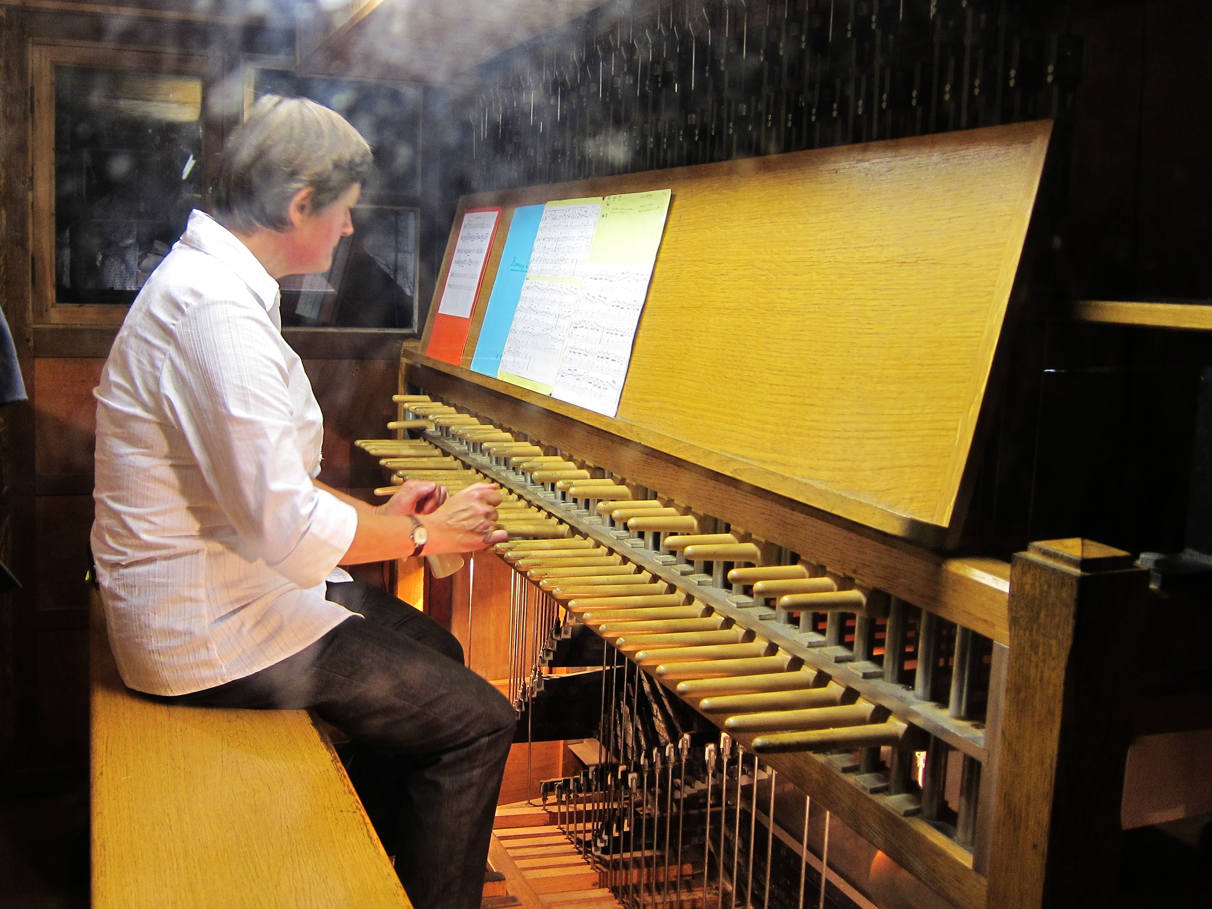 Table de jeu du carillon du beffroi de l'hôtel de ville de Douai (Nord). .